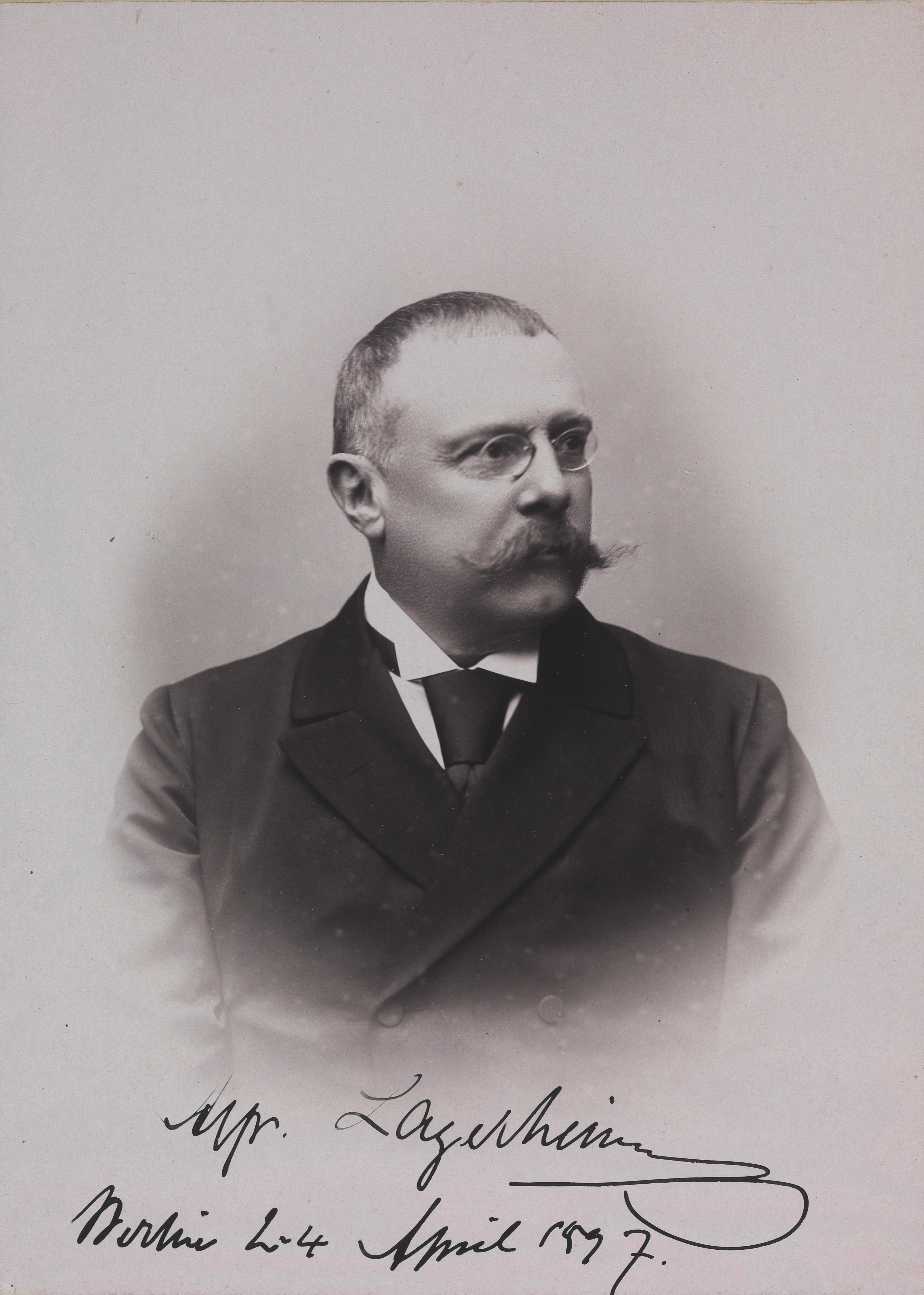 Alfred Lagerheim, svensk politiker (utenriksminister) og diplomat. Med dedikasjon. Depicted person: Lagerheim, Alfred (1843-) Depicted place: Sverige, Stockholm